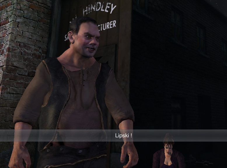 Capture d'écran du jeu Sherlock Holmes contre Jack l'Éventreur. Un homme à l'identité inconnue à l'entrée de Dutfield's Yard, s'exclamant « Lipski ! » à l'intention d'Israel Schwartz, qui n'apparaît pas sur l'image. La scène se déroule quelques minutes avant que Stride, que l'on aperçoit en bas à droite, se fasse assassiner. L'homme au centre de l'image brutalisait Stride quelques instants auparavant, mais n'est pas le meurtrier.